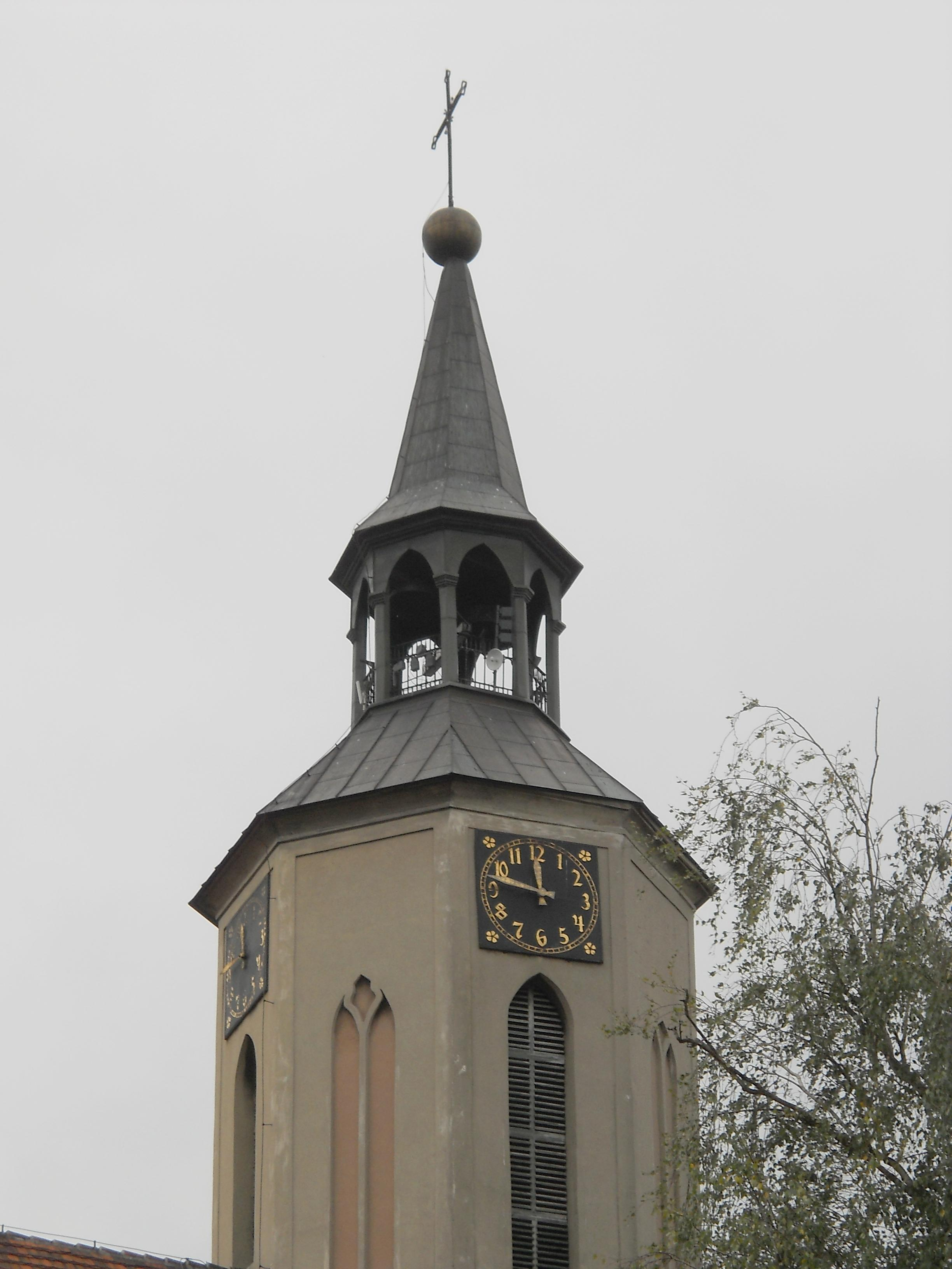 Pyskowice, ul. Poniatowskiego 10 - kościół parafialny pw. św. Mikołaja, wieża kościelna z dzwonami (zabytek nr A/289/60 z 7.03.1960)